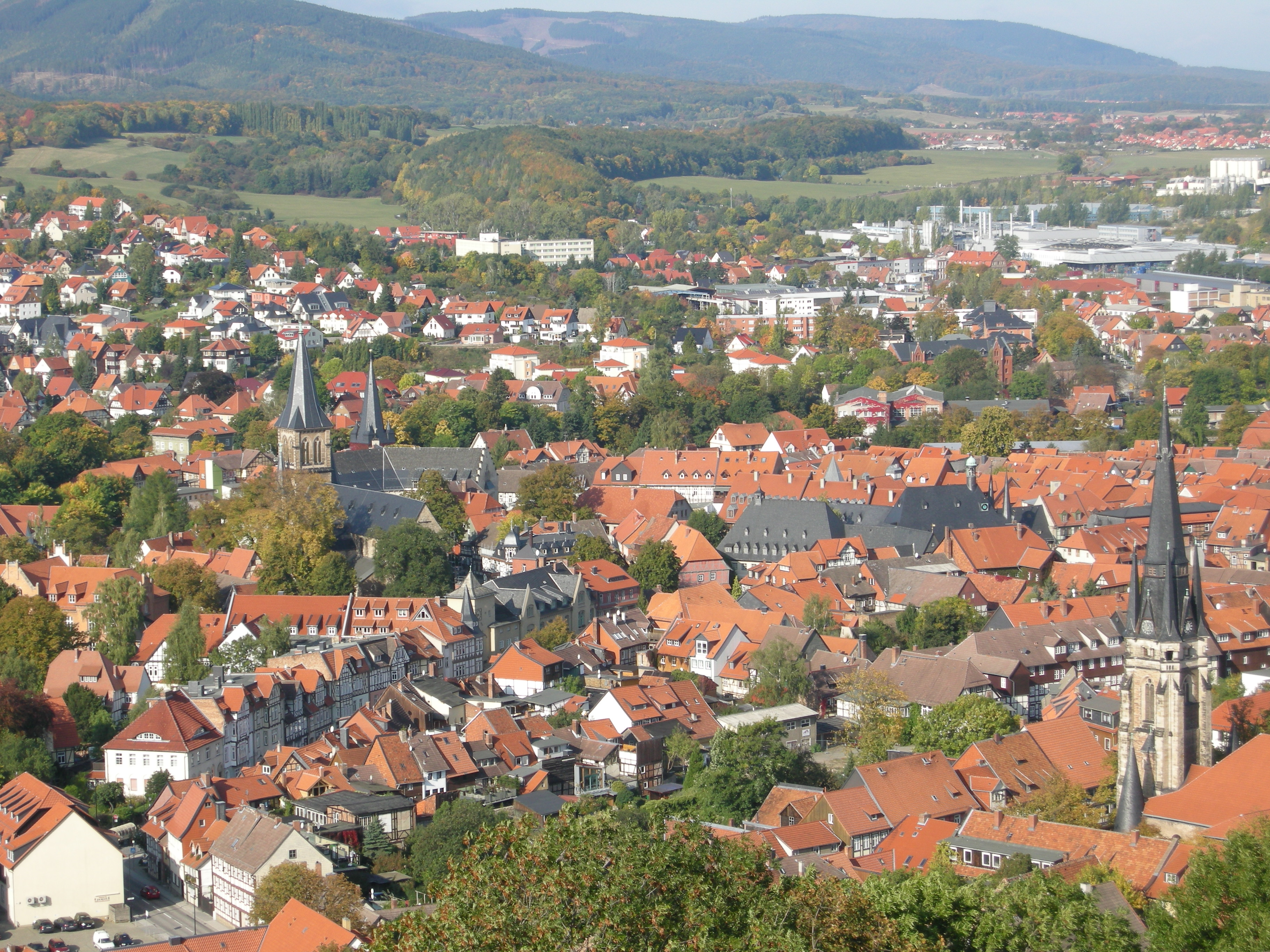 Blick vom Schloss auf die Stadtmitte Wernigerode; links: St. Sylvestri - rechts: Liebfrauenkirche - im Hintergrund Gewerbegebiet mit Hasseröder Brauerei